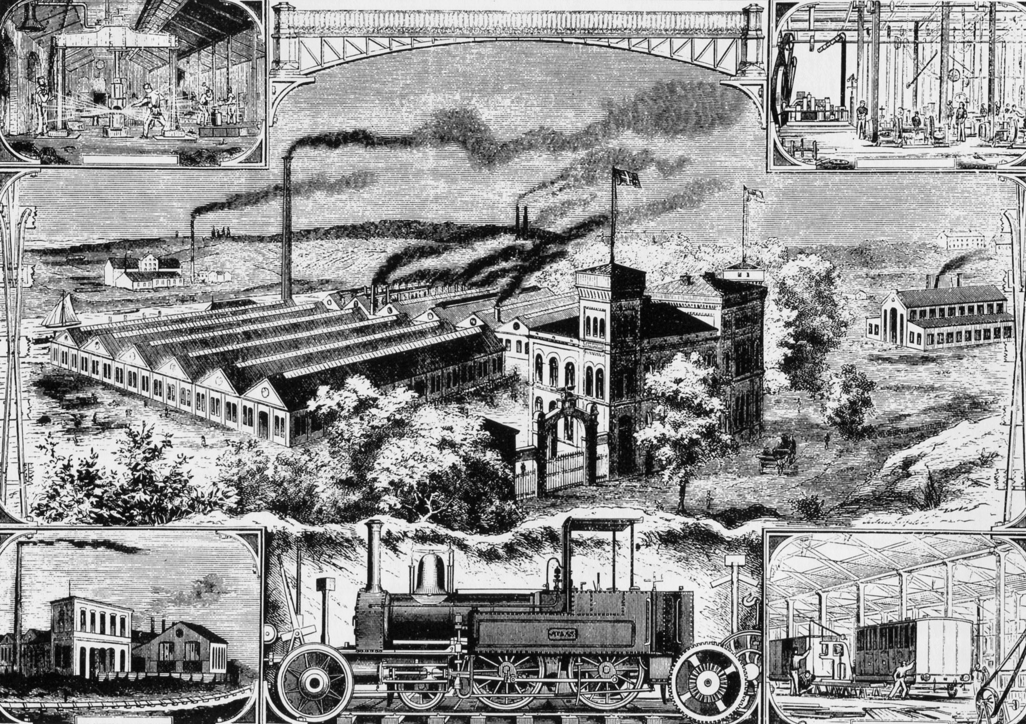 Atlasfabriken